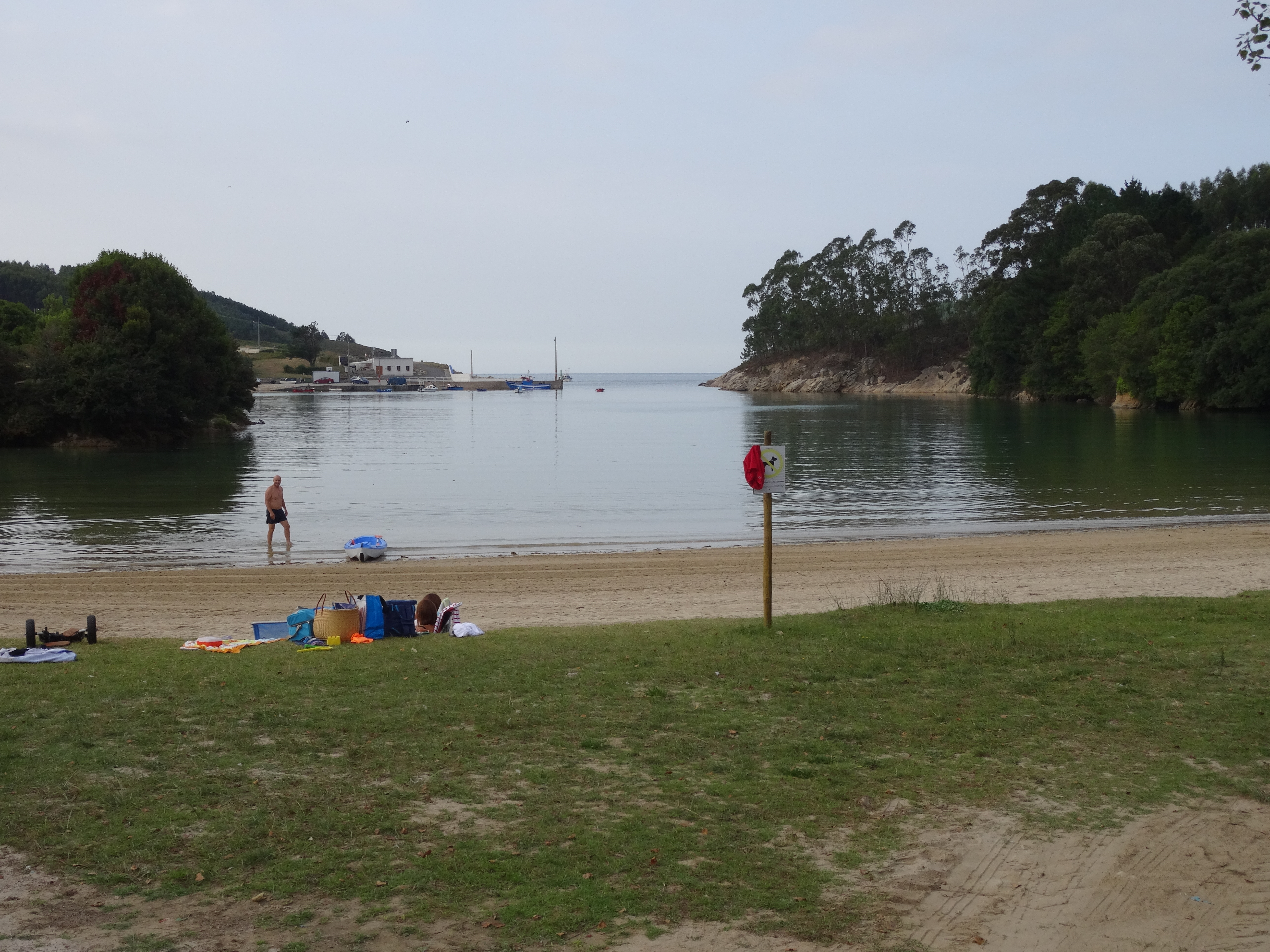 Ver nome.